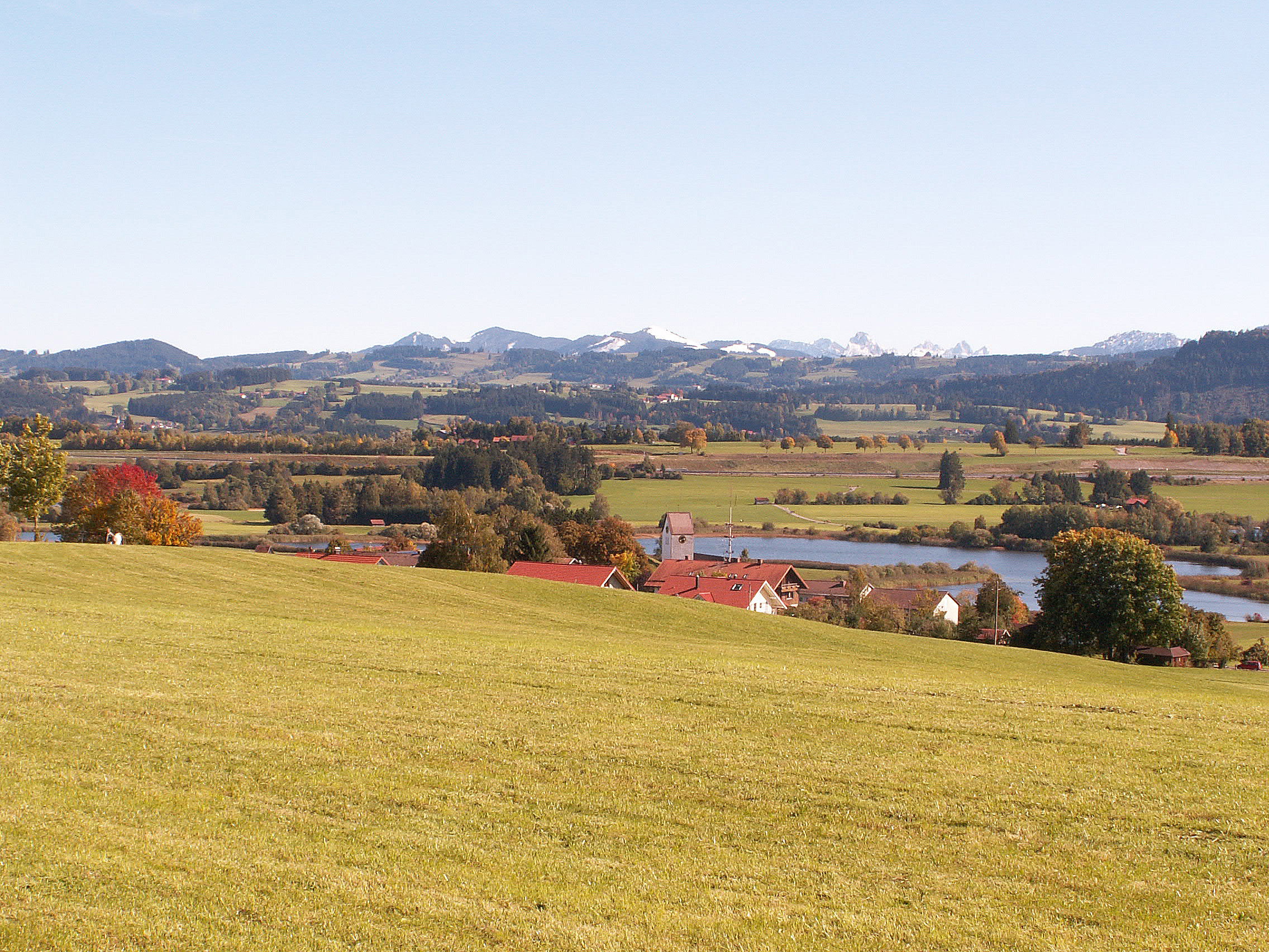 Memhölz von Nordwesten, Waltenhofen